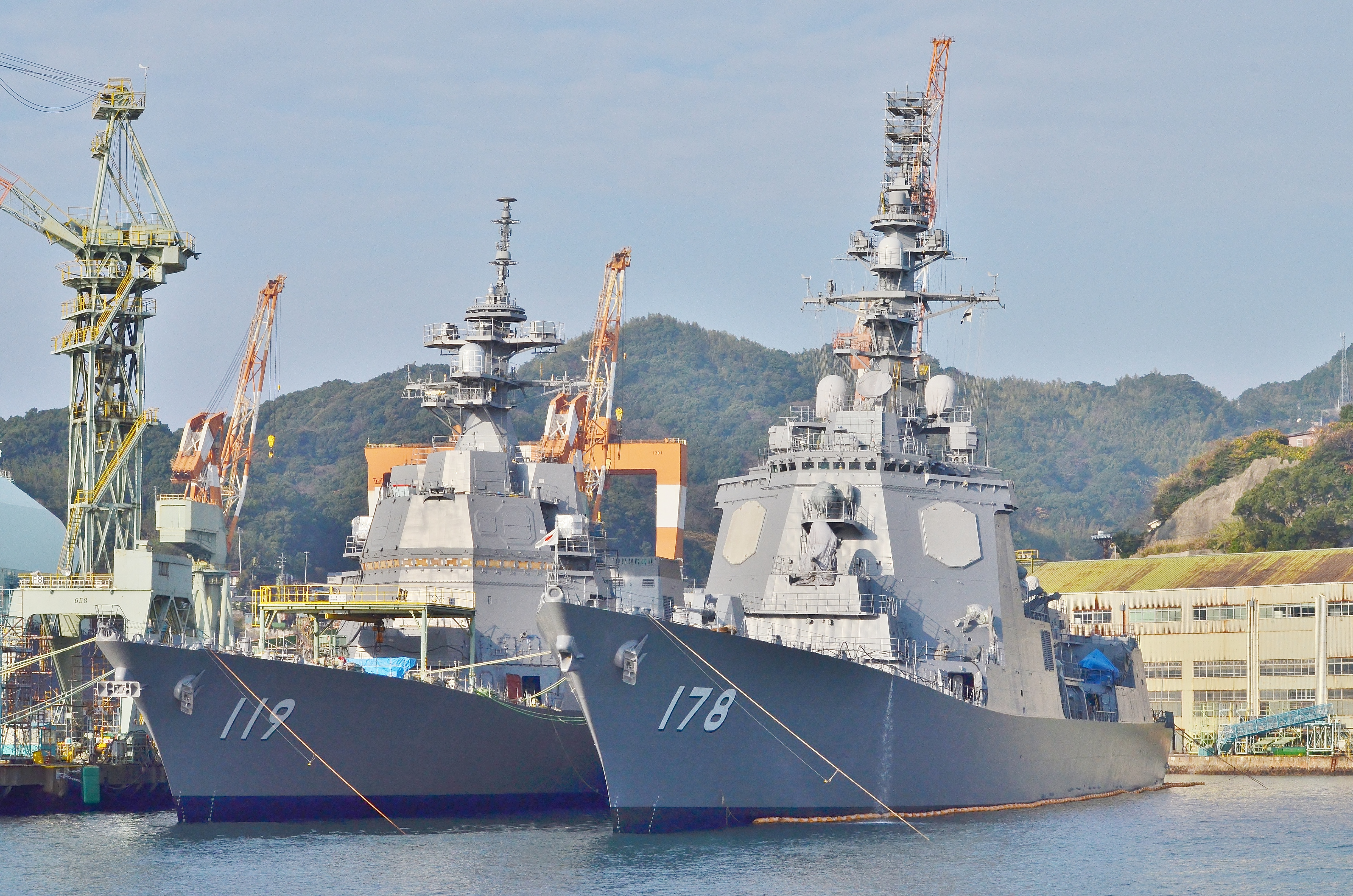 JMSDF DD-119 Asahi(the left) and DD-178 Ashigara (the right), at Mitsubishi Factory, Nagasaki.